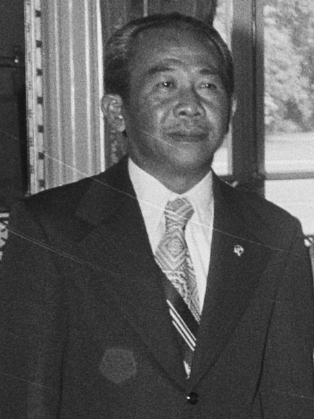 Collectie / Archief : Fotocollectie Anefo Reportage / Serie : [ onbekend ] Beschrijving : Koningin Juliana ontvangt op Huis ten Bosch de minister van Sociale Zaken van Indonesië; v.l.n.r. minister H.M.S. Mintaredja (SZ), diens echtgenote, koningin Juliana, ambassadeur Sutopo Yuwono Projohandoko Datum : 24 juni 1974 Locatie : Den Haag, Zuid-Holland Trefwoorden : ambassadeurs, koninginnen, ministers, ontvangsten Persoonsnaam : Juliana (koningin Nederland), Mintaredja, H.M.S., Sutopo Yuwono Projohandoko, Instellingsnaam : Ministerie van Sociale Zaken Fotograaf : Punt, […] / Anefo Auteursrechthebbende : Nationaal Archief Materiaalsoort : Negatief (zwart/wit) Nummer archiefinventaris : bekijk toegang 2.24.01.05 Bestanddeelnummer : 927-2777